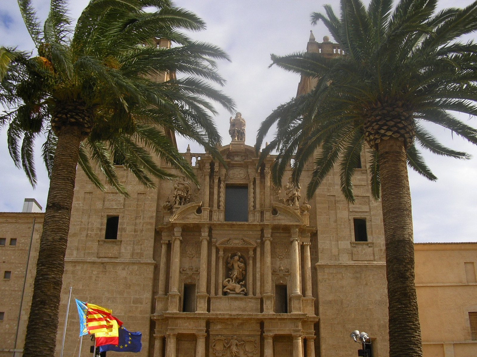 Monestir de Sant Miquel dels Reis de València (Espanya)